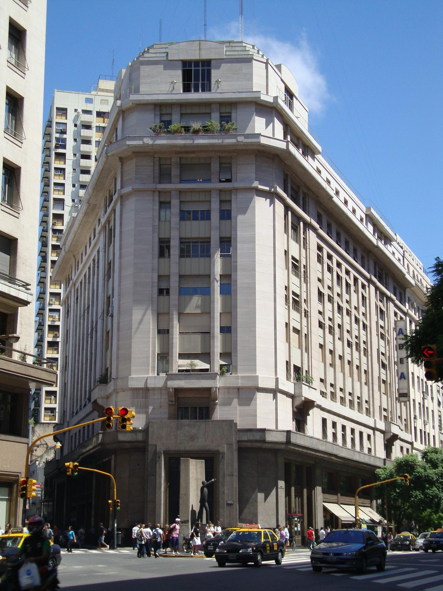 Edificio Volta, sede de la CHADE en Buenos Aires, Argentina. Se encuentra en Diagonal Norte, esquina Perón y Esmeralda.